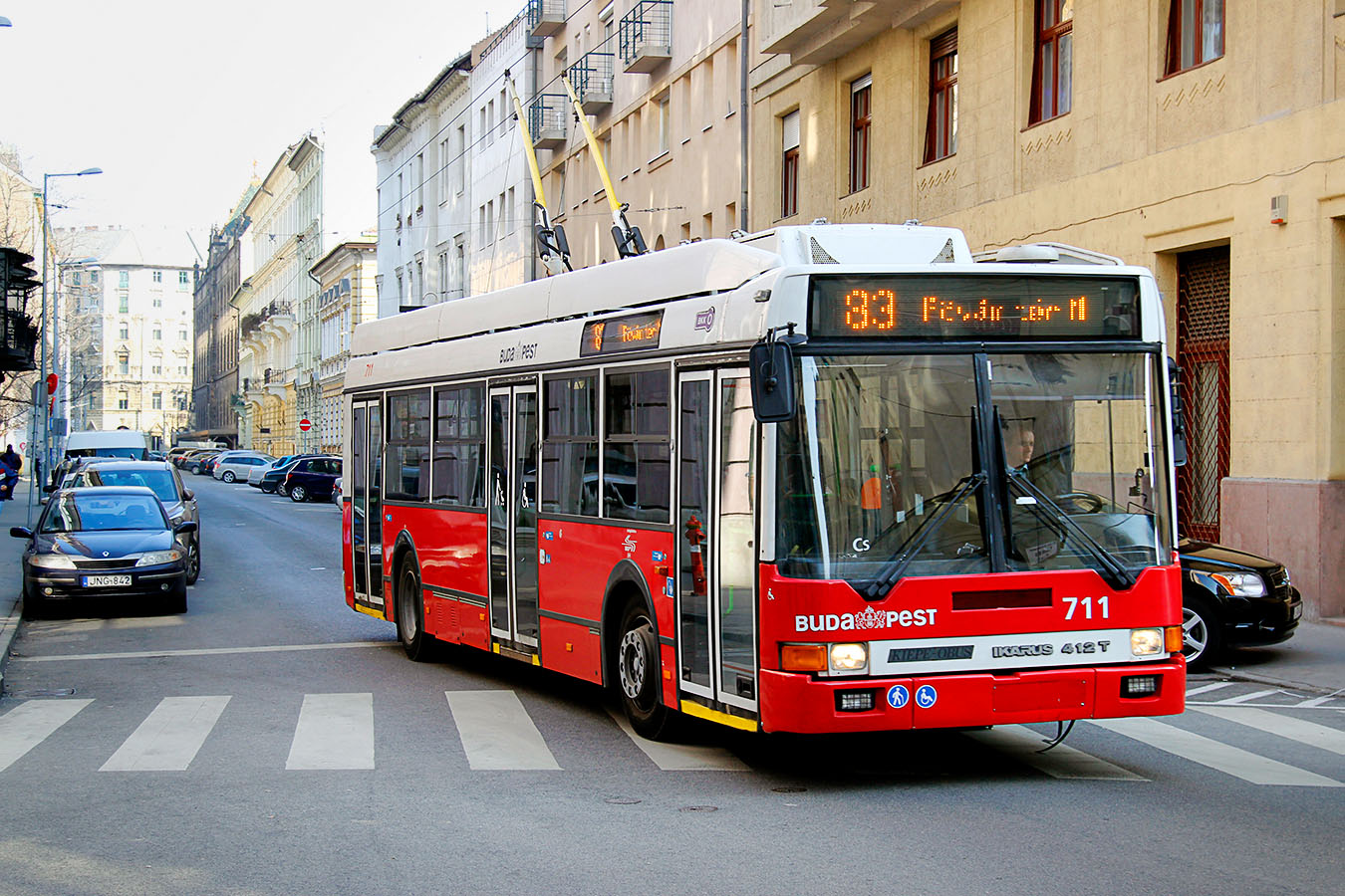 Ikarus 412T típusú trolibusz a 83-as vonalon